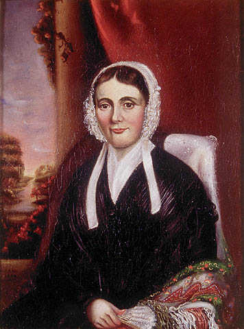 Mackenzie's wife, Isabel.